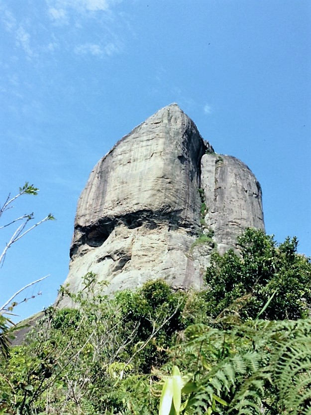 Trilha Pedra da Gávea